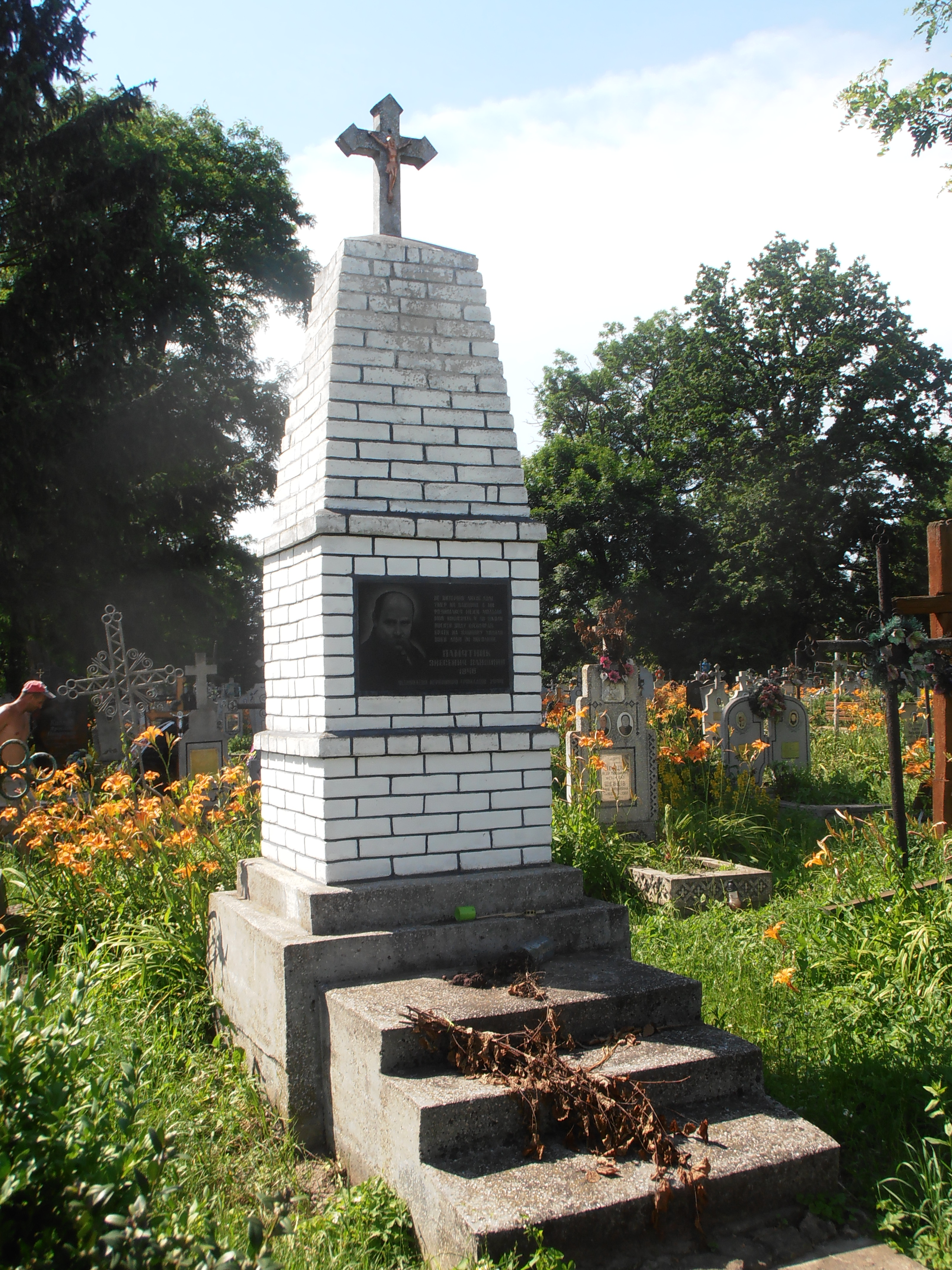 Хрест Знесення панщини в Підпечерах